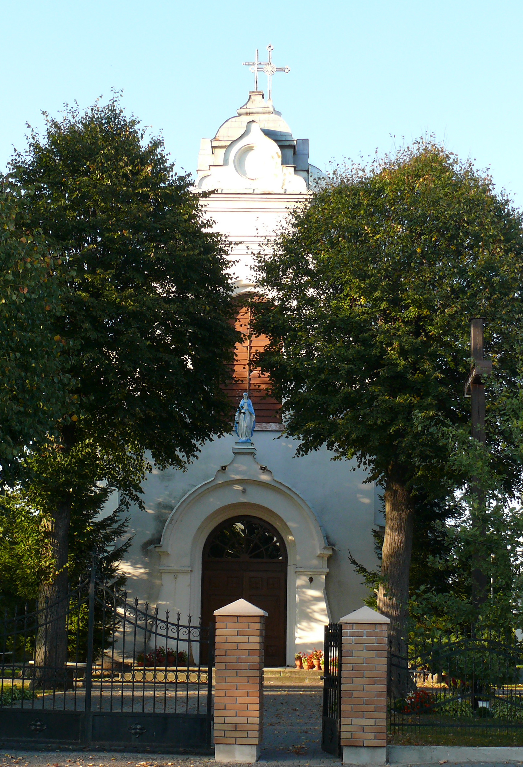 Prawosławna cerkiew, obecnie kościół rzymsko - katolicki, parafia pod wezwaniem Narodzenia Najświętszej Marii Panny wybudowana w latach 1889-1890 w miejscowości Szóstka w gminie Drelów w powiecie bialskim woj. lubelskie. - Ściana frontowa, wejście. (Zabytek nr. A-251)